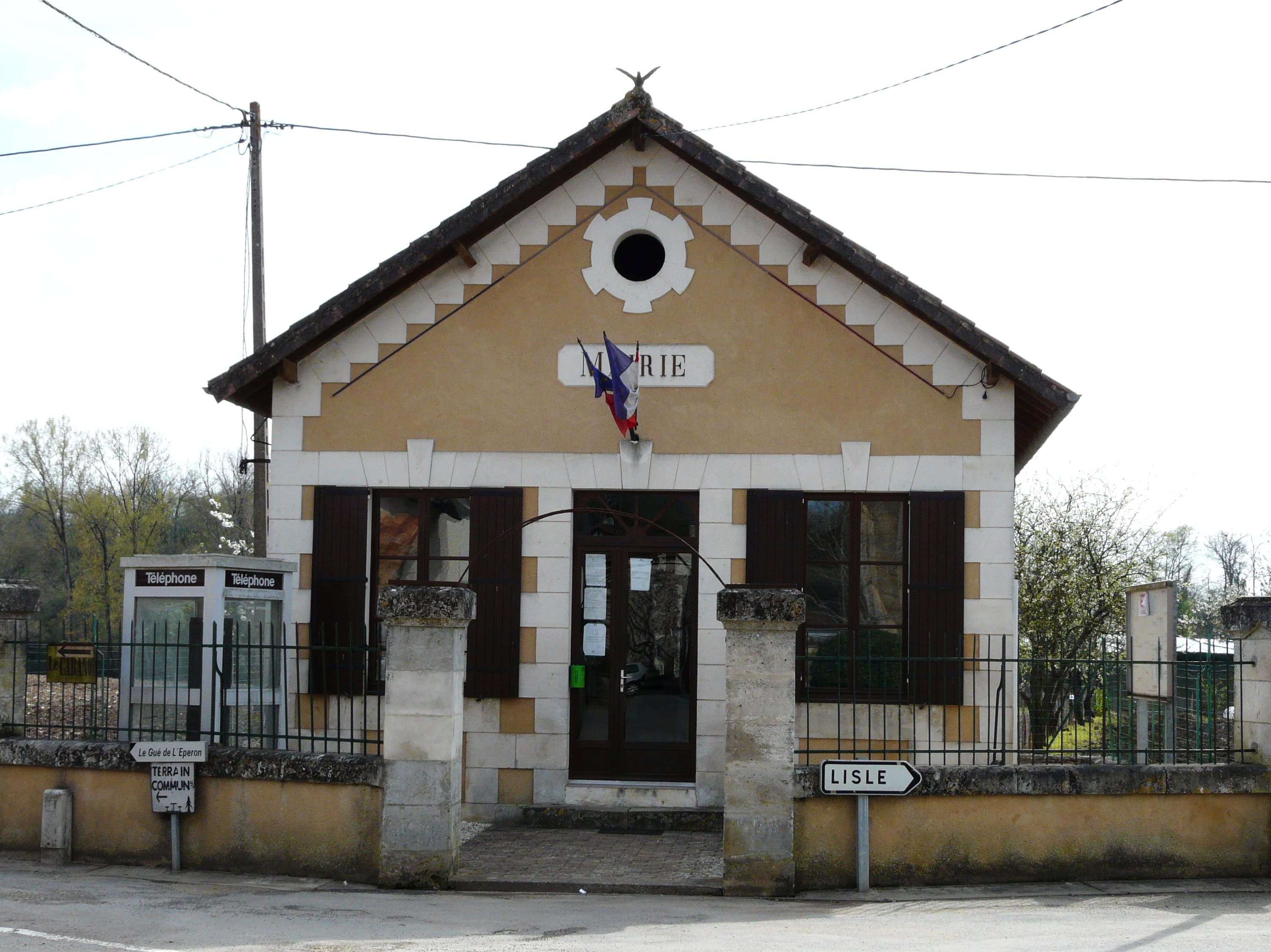 La mairie de Creyssac, Dordogne, France.